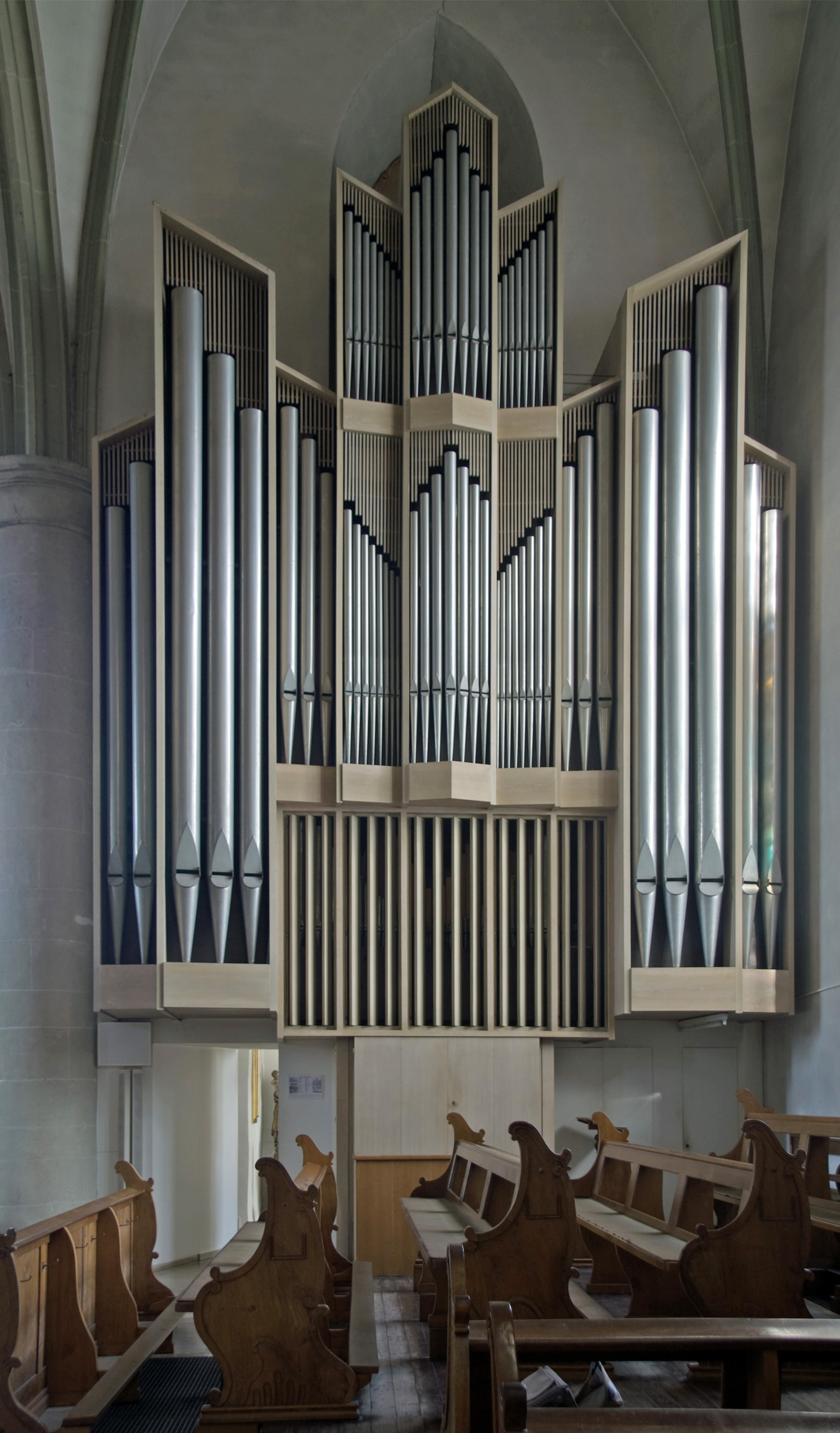 Orgel der Propsteikirche St. Petrus und Andreas in Brilon